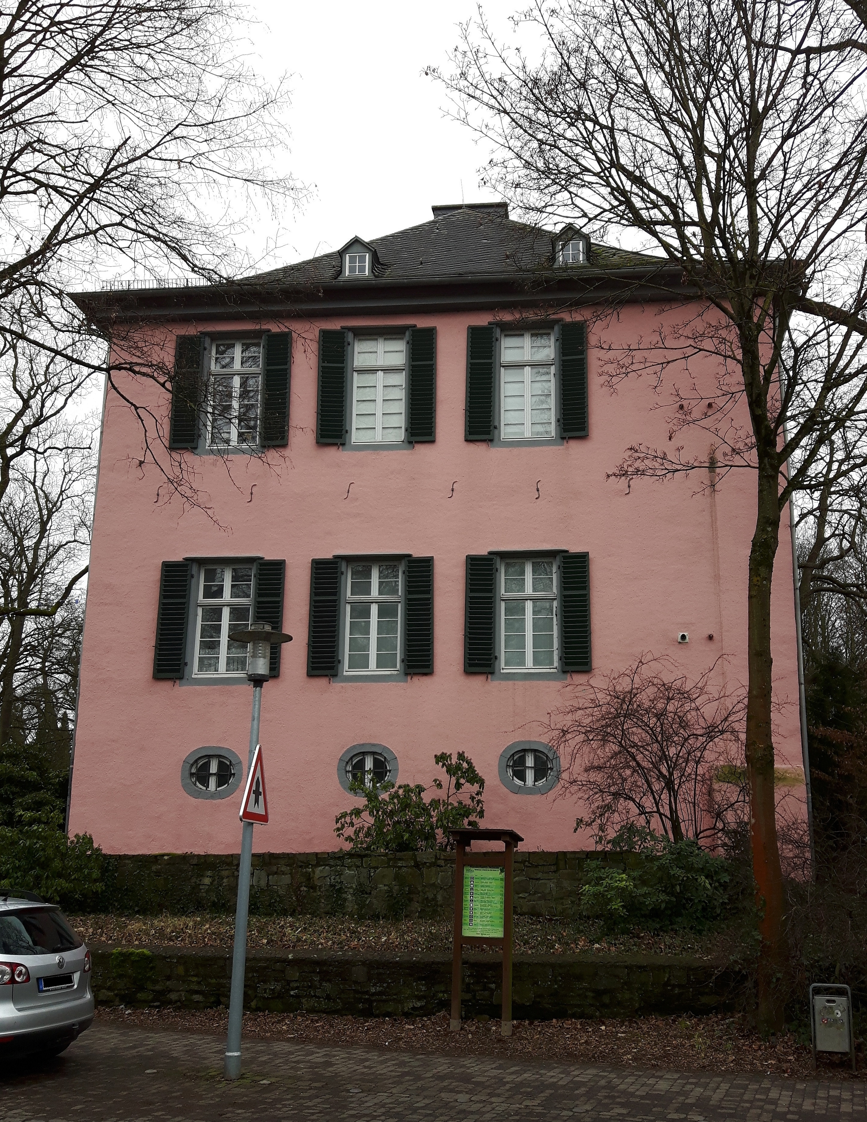 Arnsberg-Neheim, Fresekenhof (Seitenansicht von der Mendener Straße)